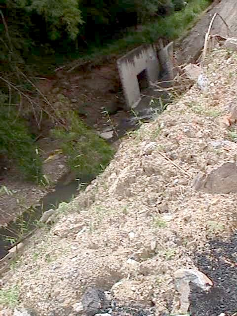 Lecho de la quebrada La Boyera a nivel CMDLT